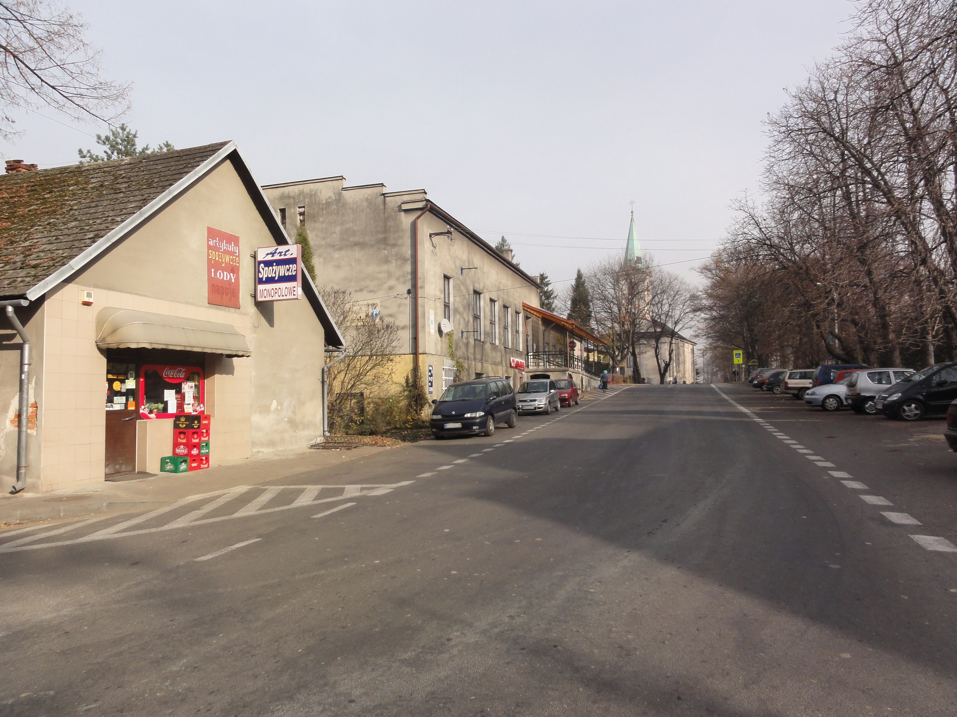 Centrum Drogomyśla, w głębi kościół ewangelicki